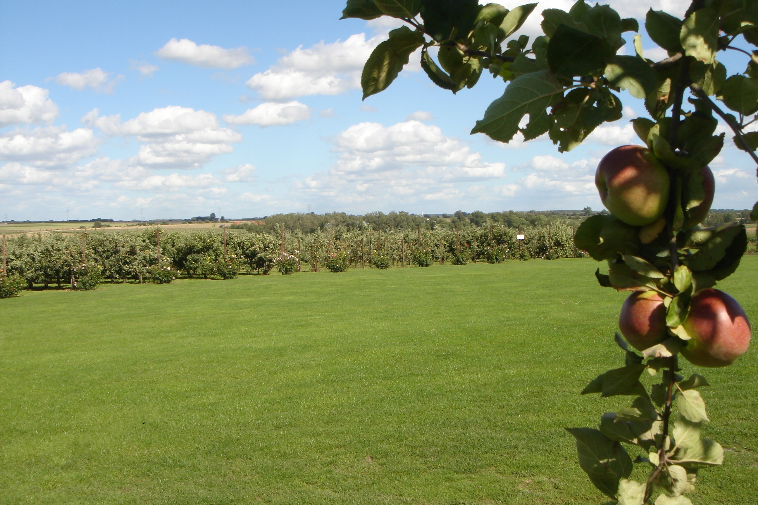 Le Quesnoy vue sur verger Tillier